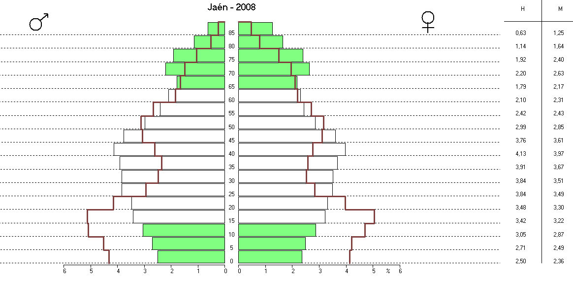 Pirámide de población de la provincia de Jaén en el año 2008, comparada con 1981